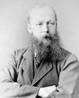 Retrat del matemàtic britànic Joseph Wolstenholme (1829-1891)